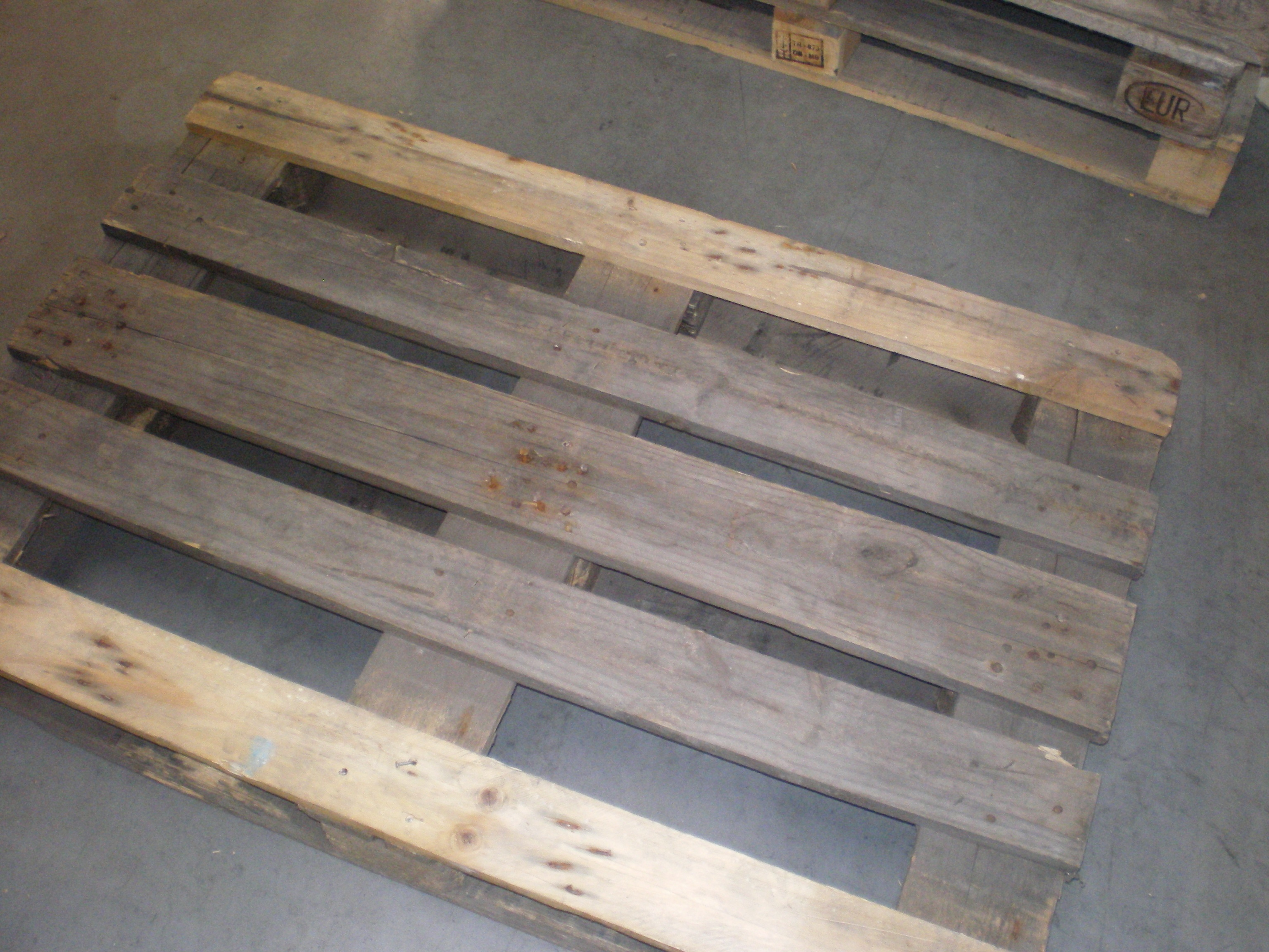 Illegal reparierte Europalette